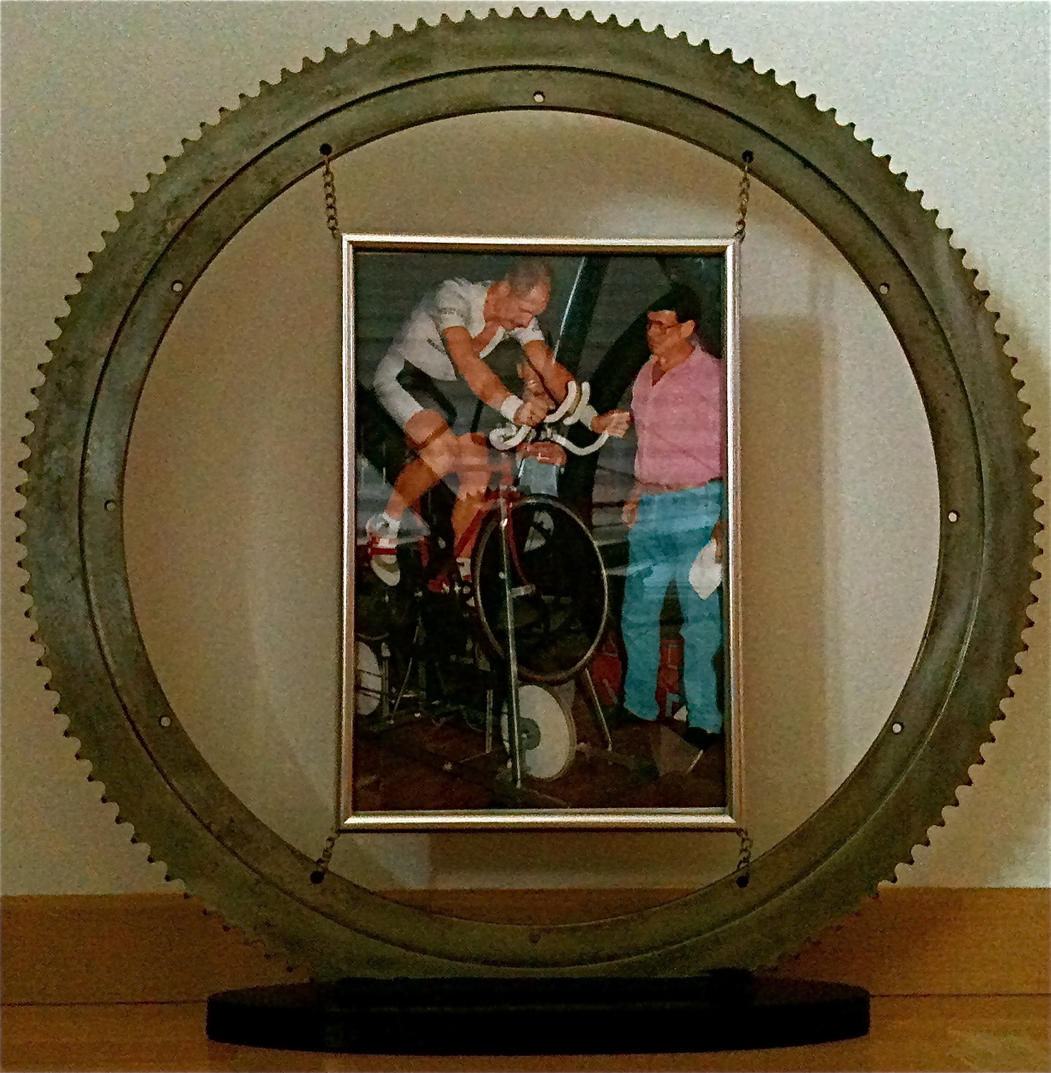 Herman Goovaerts tijdens het uurrecord op vaste rollen en het voorste tandwiel dat daarvoor werd gebruikt.